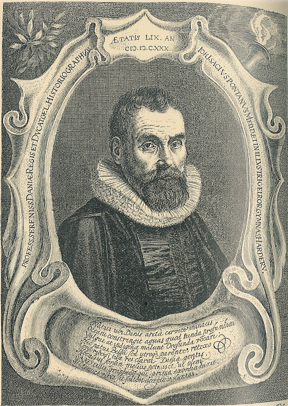 Johan Isaksen Pontanus. 1631.